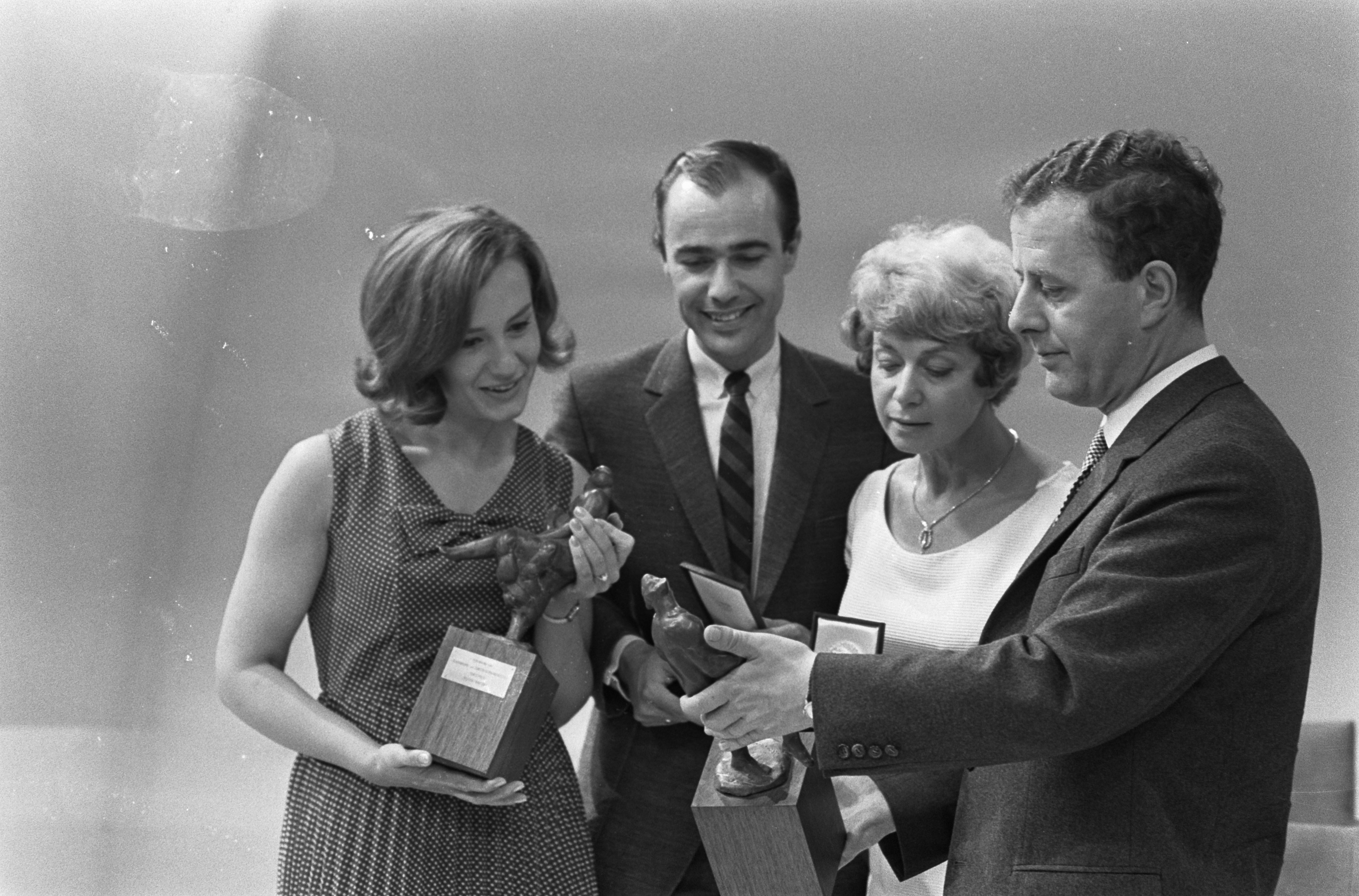 Anne Wil Blankers met de Colombina; Eric Schneider met de Louis d'Or; Anny de Lange met de Theo d'Or; Luc Lutz met de Arlecchino. 1967